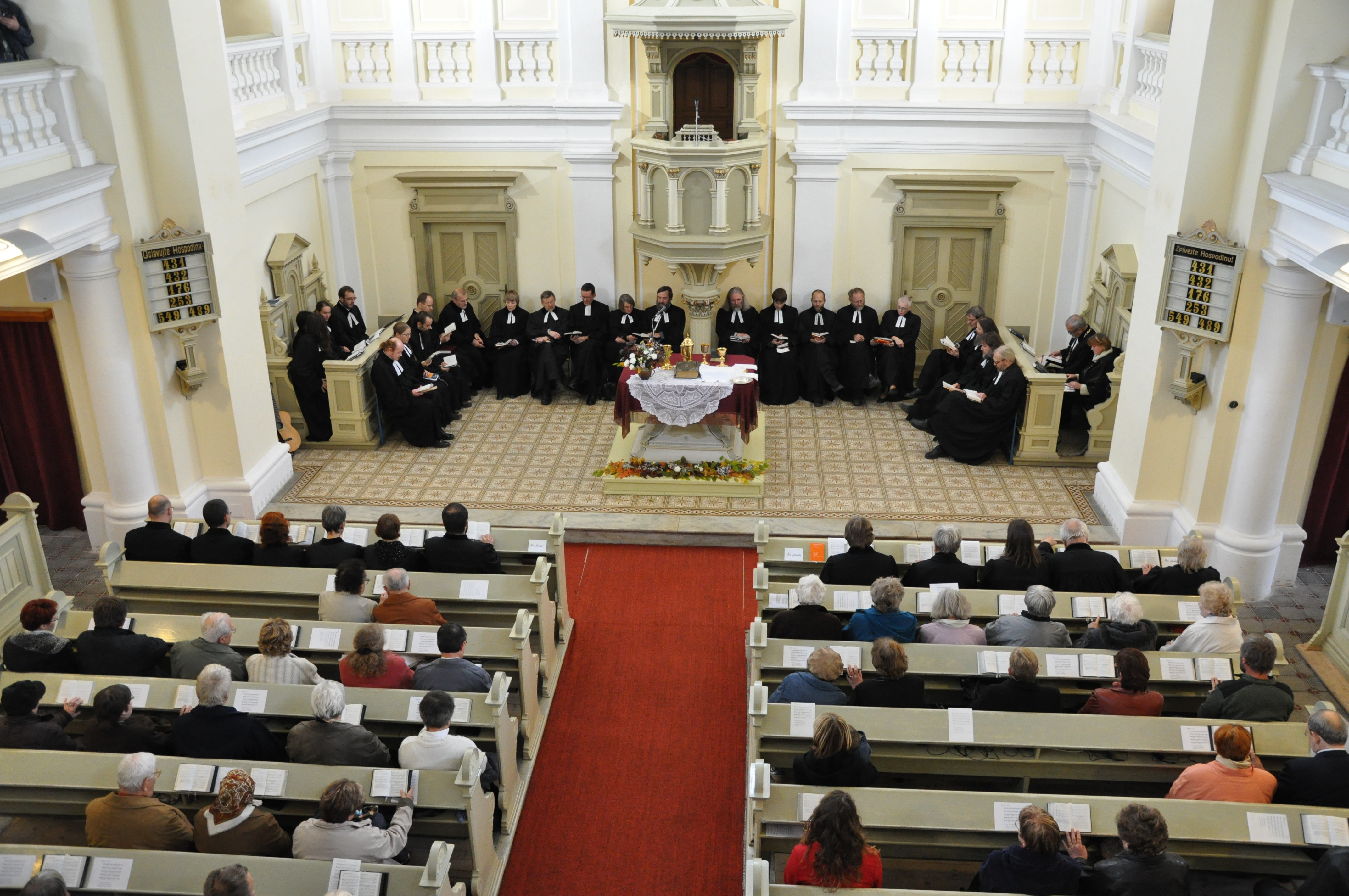 V levé lavici sedí (v pořadí zleva): Jonatan Hudec Pavlína Lukášová Debora Rumlová Ondřej Ruml V půlkruhu kolem stolu Páně sedí (v pořadí zleva): Tomáš Mencl Debora Hurtová Richard Dračka ? Pavel Ruml Jana Rumlová Miroslav Čejka Martin Prudký Abigail Hudcová Petr Hudec (kazatelna) Zdeněk Šorm Michal Kitta Filip Keller Jan Keller Irena Škeříková Pavel Kalus Václav Hurt Štěpán Hájek Zvonimír Šorm V pravé lavici sedí (v pořadí zleva): Joel Ruml Eva Zadražilová